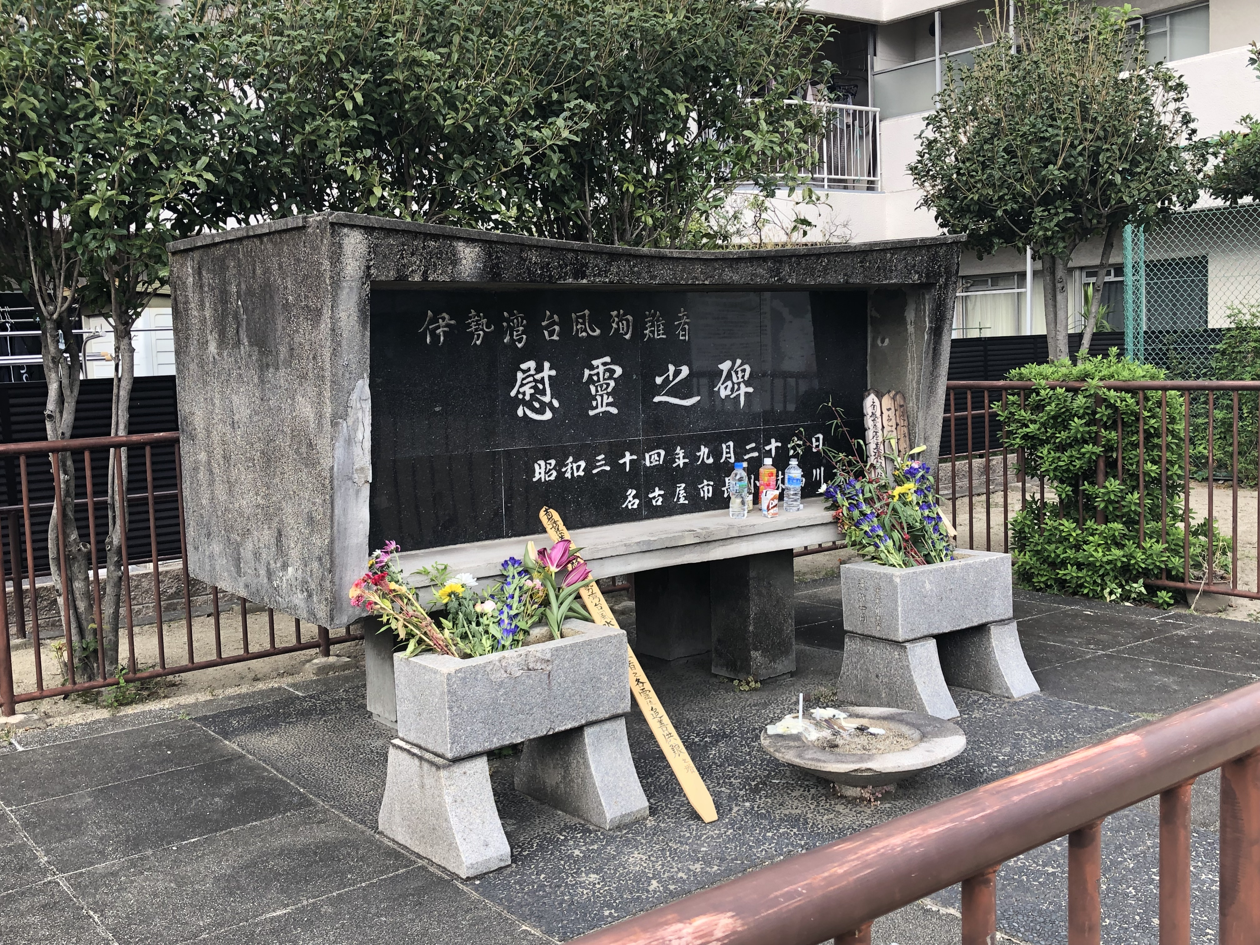 名古屋市南区浜田町3丁目にある浜田南公園にある伊勢湾台風殉難被害者慰霊の碑。伊勢湾台風による高潮で亡くなった人を慰霊するために名古屋市と地元住民によって昭和35年4月に名古屋市と地元住民によって建てられた。